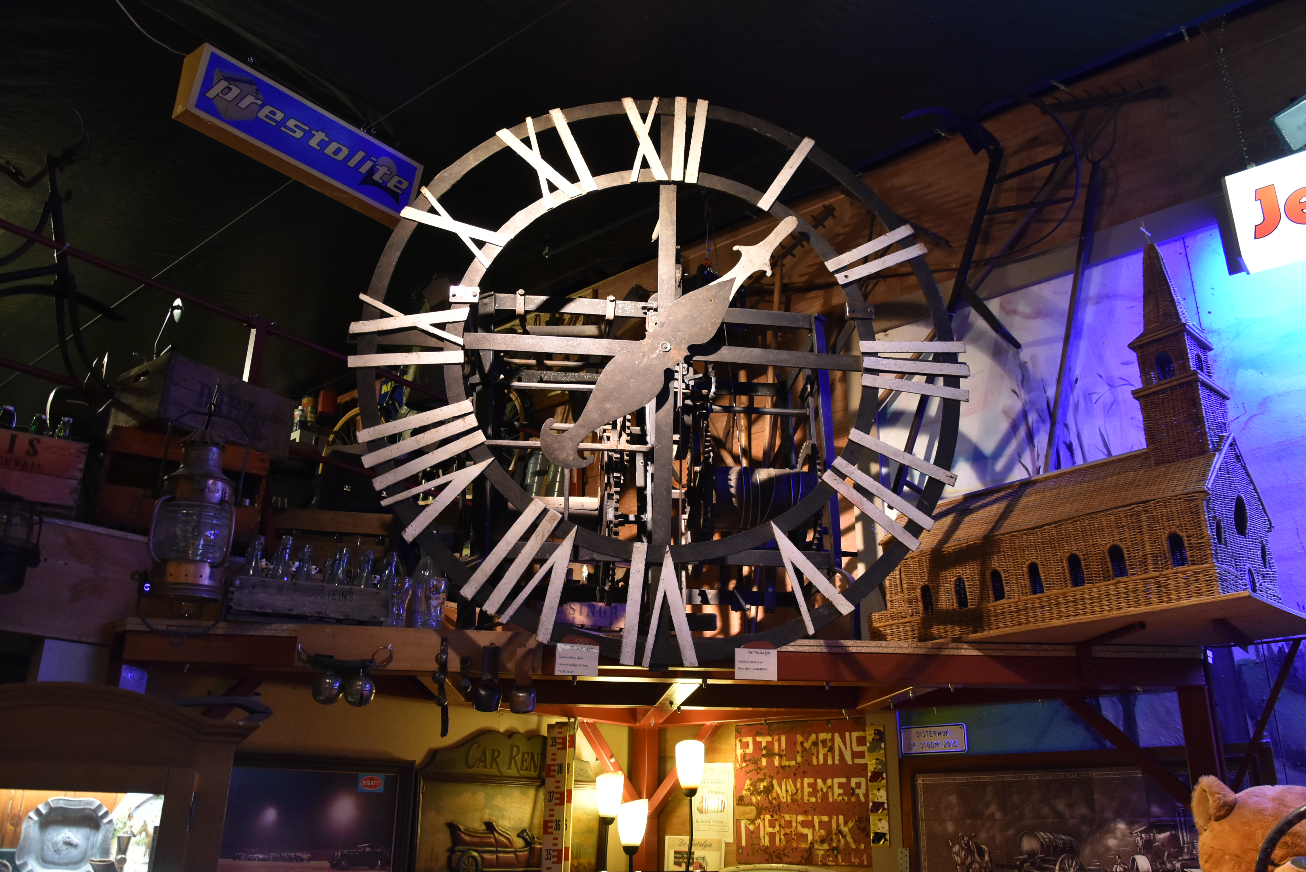 Torenuurwerk (1706 - Stein) Landbouwmuseum De Nostalgie - Uikhoven 10-06-2019